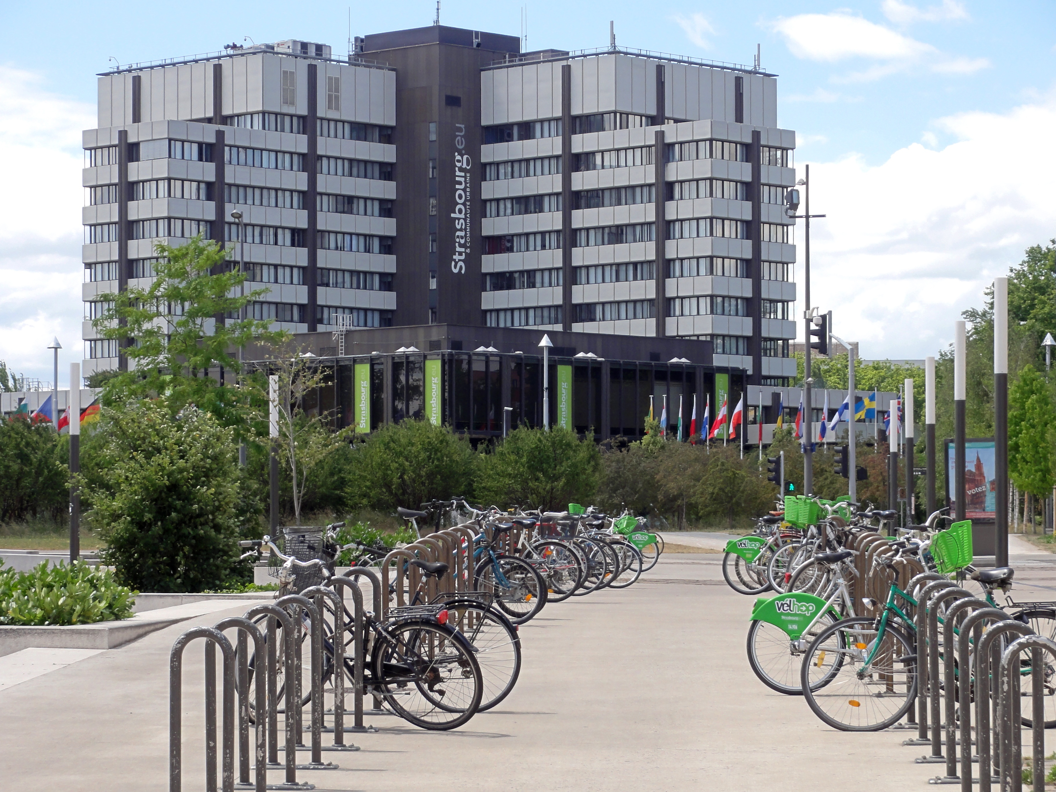 Alsace, Bas-Rhin, Strasbourg, Centre administratif de l'Eurométropole de Strasbourg, place de l'Etoile.